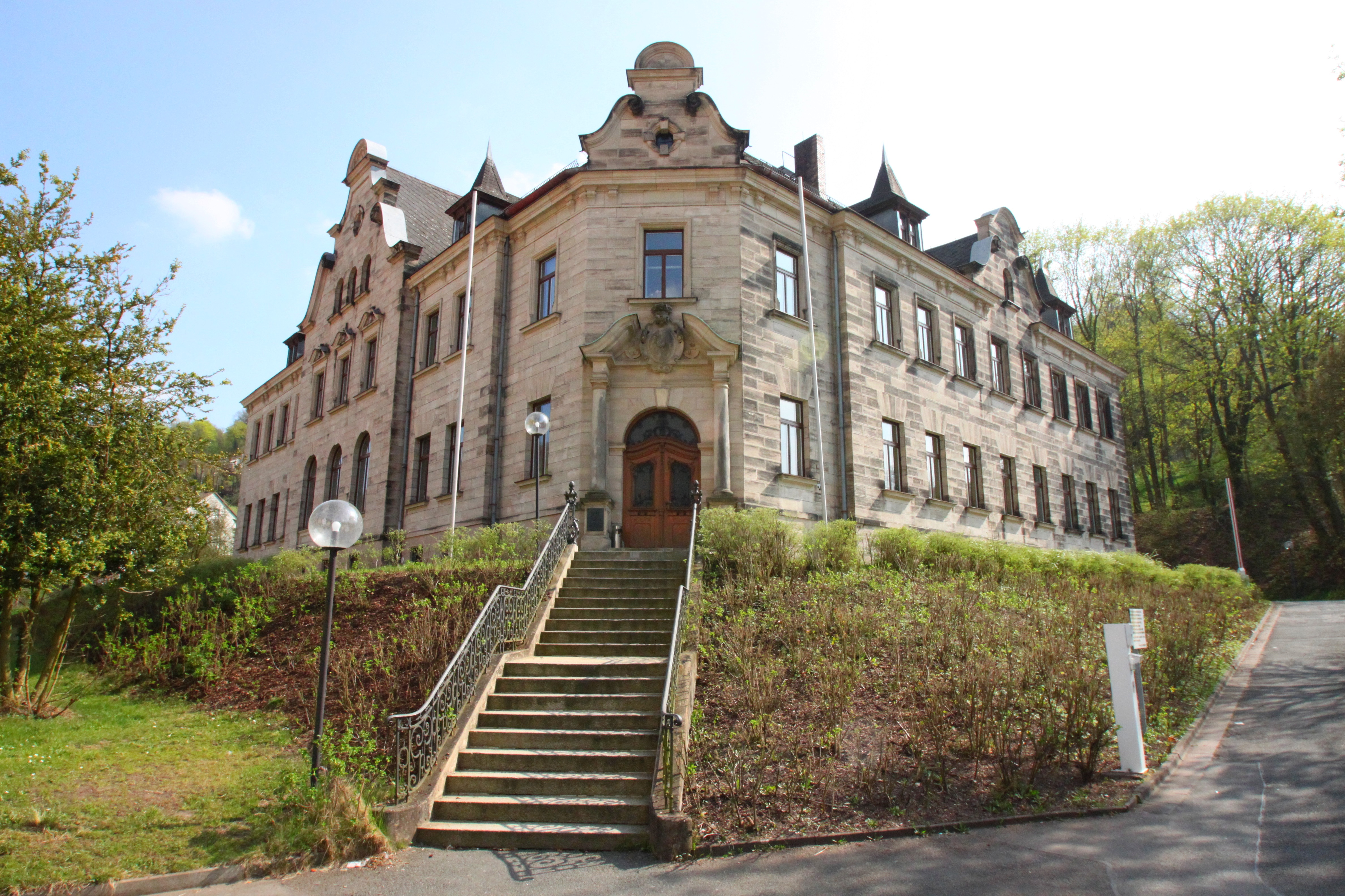 Amtsgerichtsgebäude, Kohlenbachstraße 10, Kulmbach, Baudenkmal D-4-77-128-55